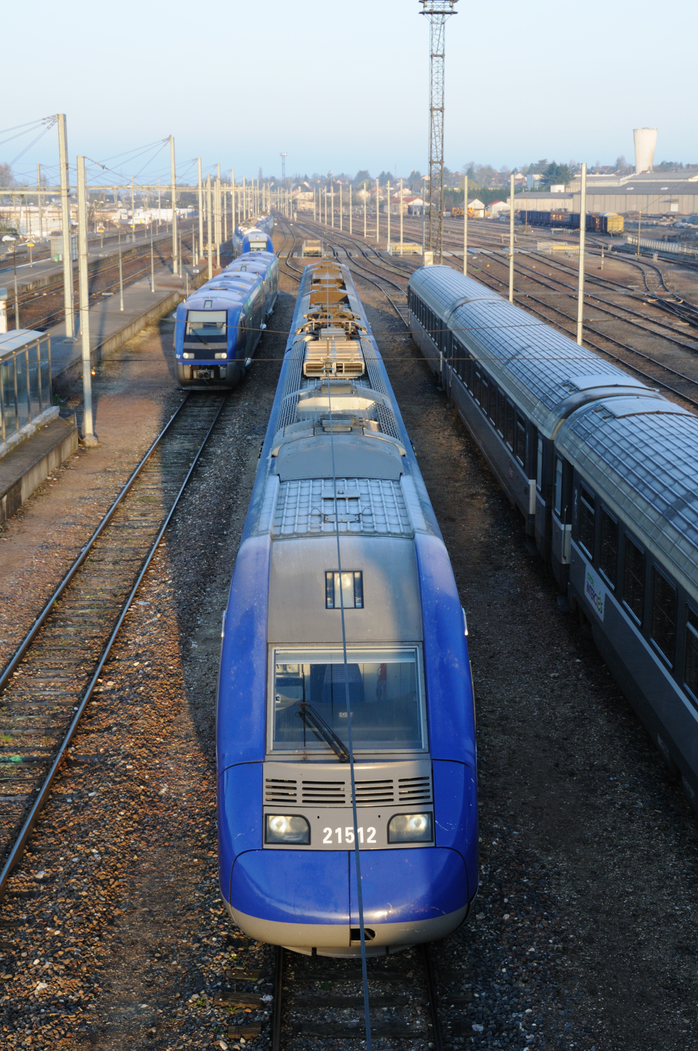 Gare de Bourges, Cher, France